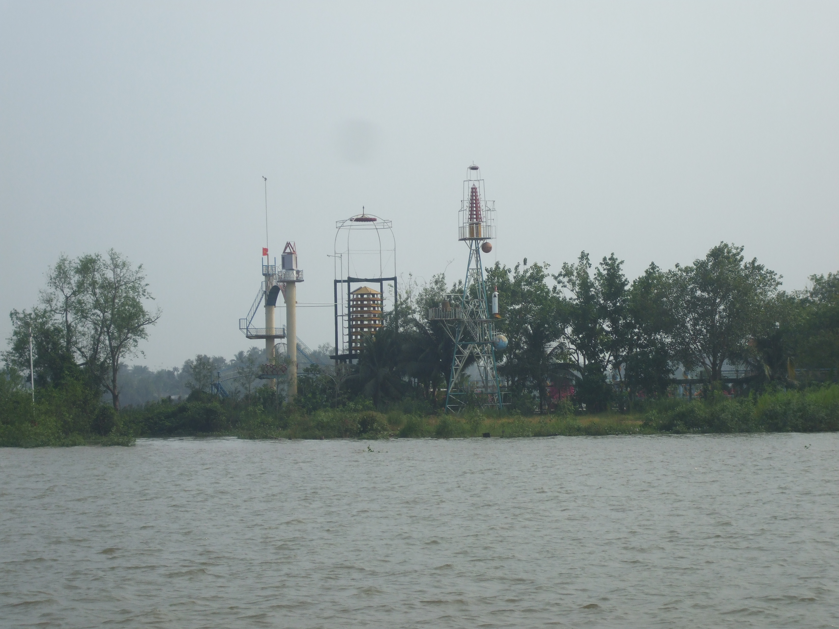 Nơi hành đạo của ông Đạo Dừa tại cồn Phụng (Bến Tre) trước năm 1975.